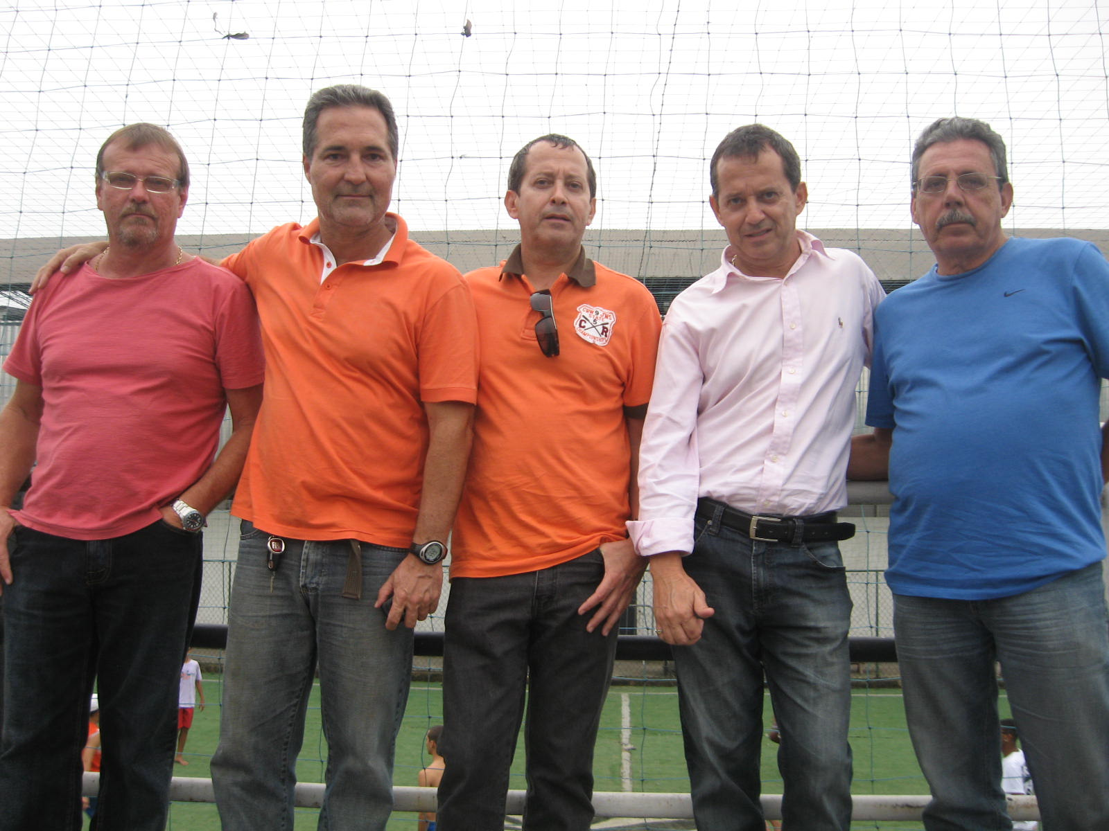 Diretoria do Nova Iguaçu FC em 2010.